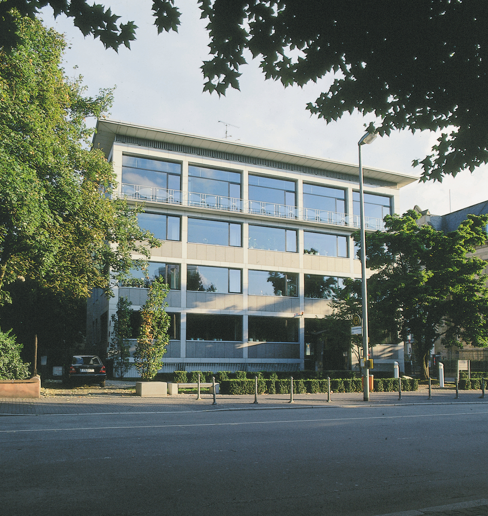 Geschäftsgebäude Nassauische Heimstätte im Schaumainkai Frankfurt